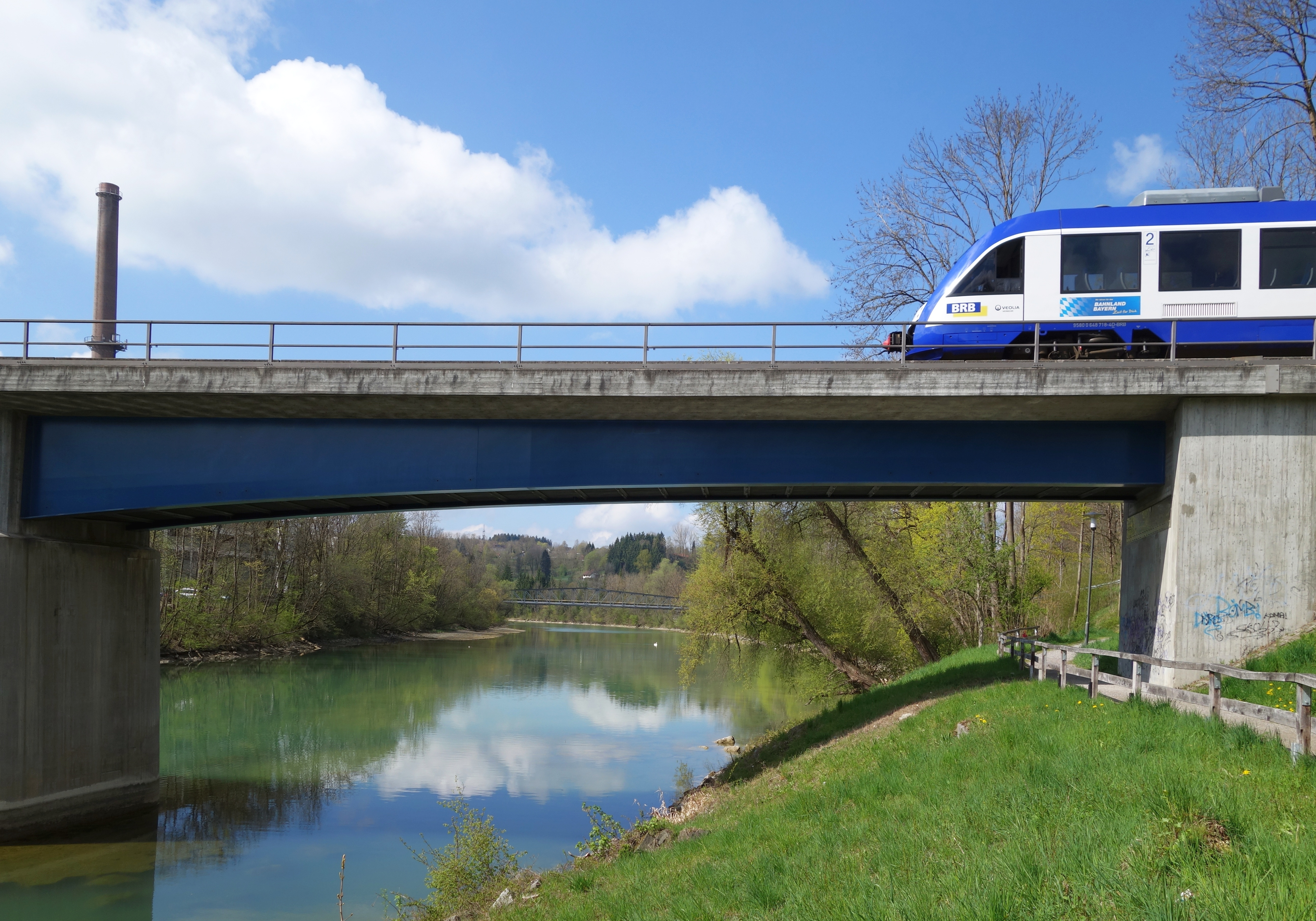 Eisenbahnbrücke über den Lech in Schongau, auf dieser der VT 218 „Schondorf“ der Bayerischen Regiobahn.